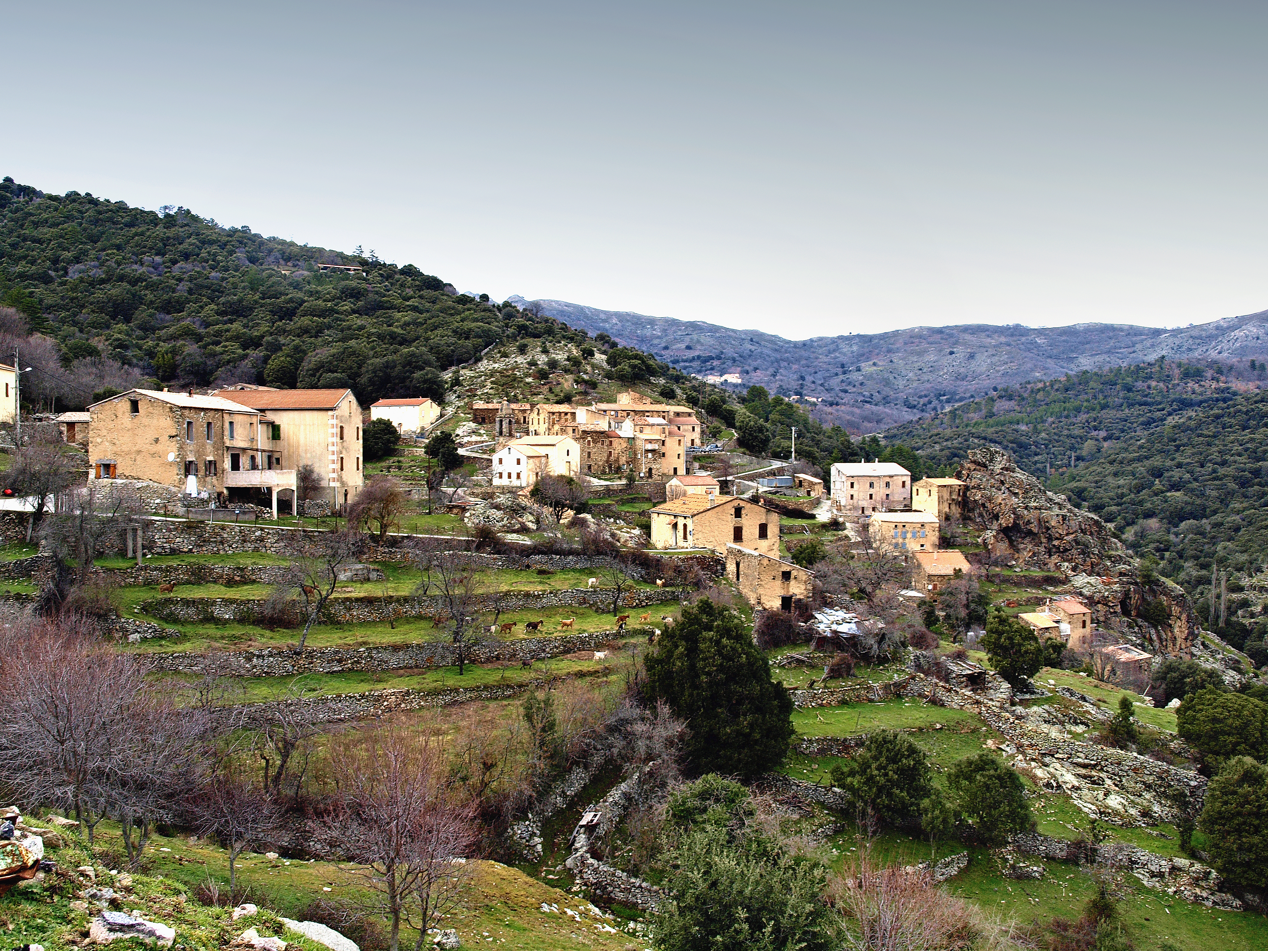 Mausoléo (Corsica) - Vue du village